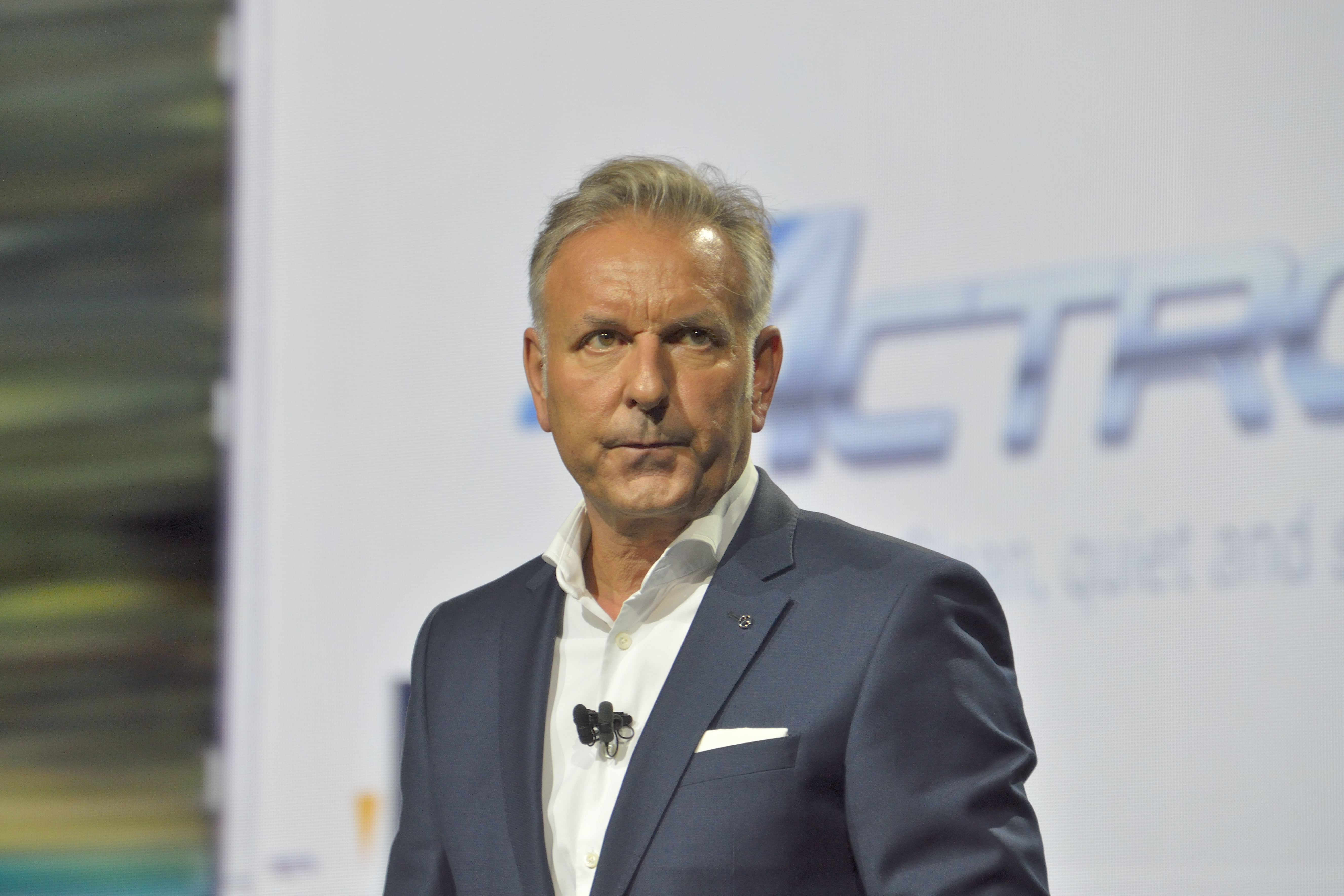 Stefan Buchner. Mitglied des Bereichsvorstandes Daimler Trucks und Leiter Mercedes-Benz Lkw (Stand 2019).